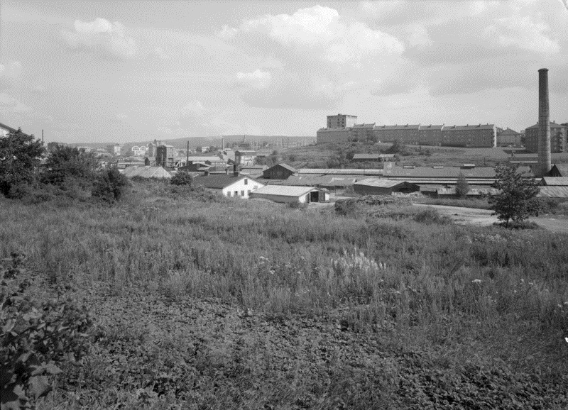 Fra Økernveien mot Hovin teglverk, kulturlandskap, Hovin teglverk, boligblokker.